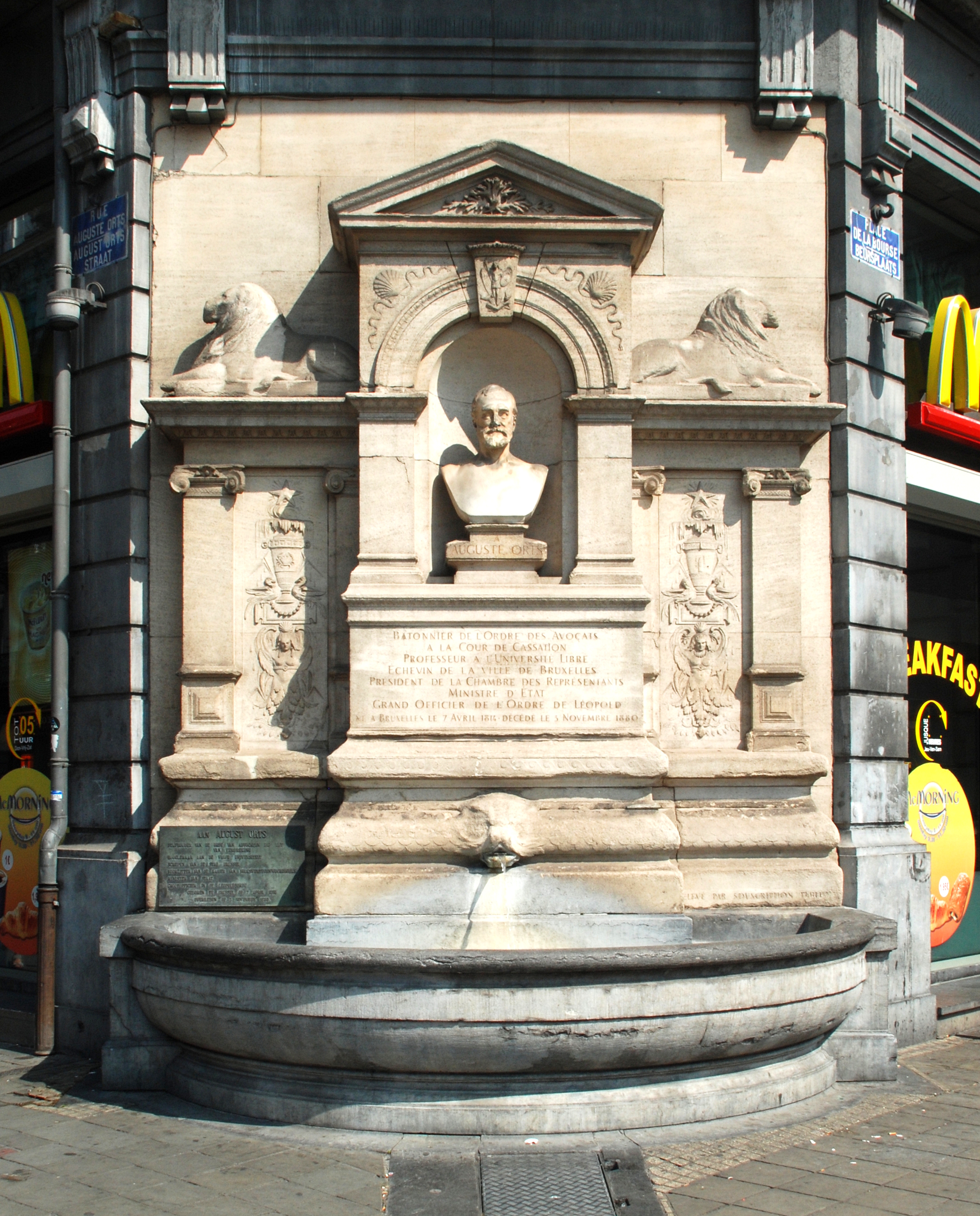 Belgique - Bruxelles - Fontaine Orts (angle rue Orts et place de la Bourse)